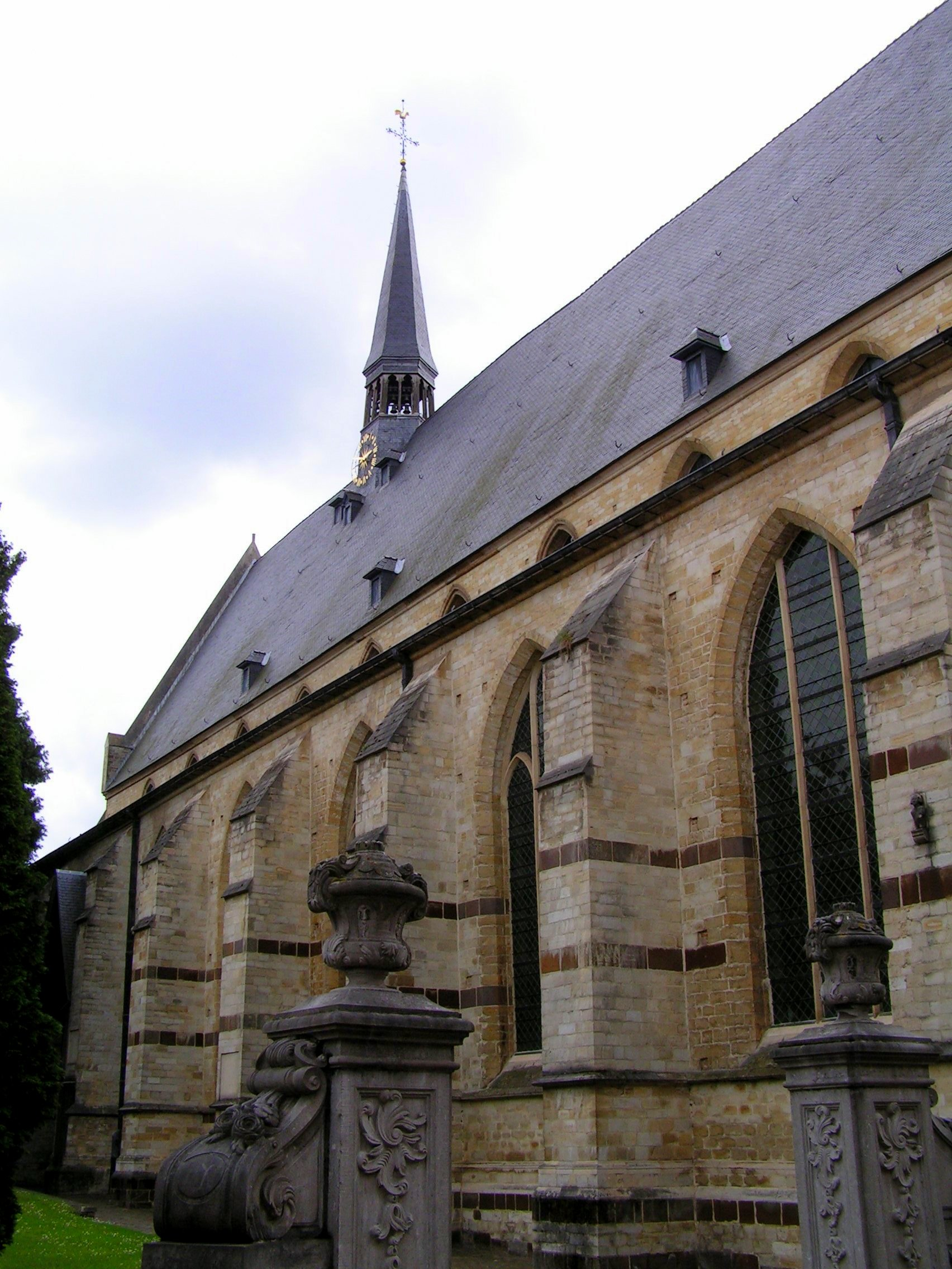 Sint Jan de Doper, Leuven, Belgium